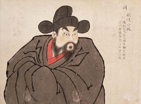 朝鮮通信使人物図（文化8年来聘朝鮮通信使図）中 副使 李勉求の画像(黒団領着用)